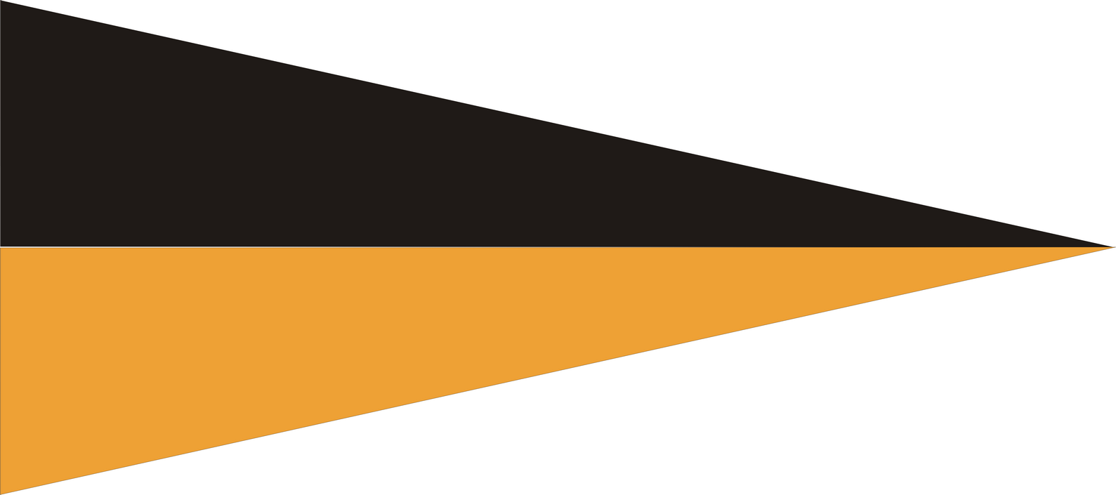 Proporczyk broni pancernej (na kołnierz) wprowadzony w Wojsku Polskim w Anglii w 1941